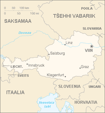 Austria kaart